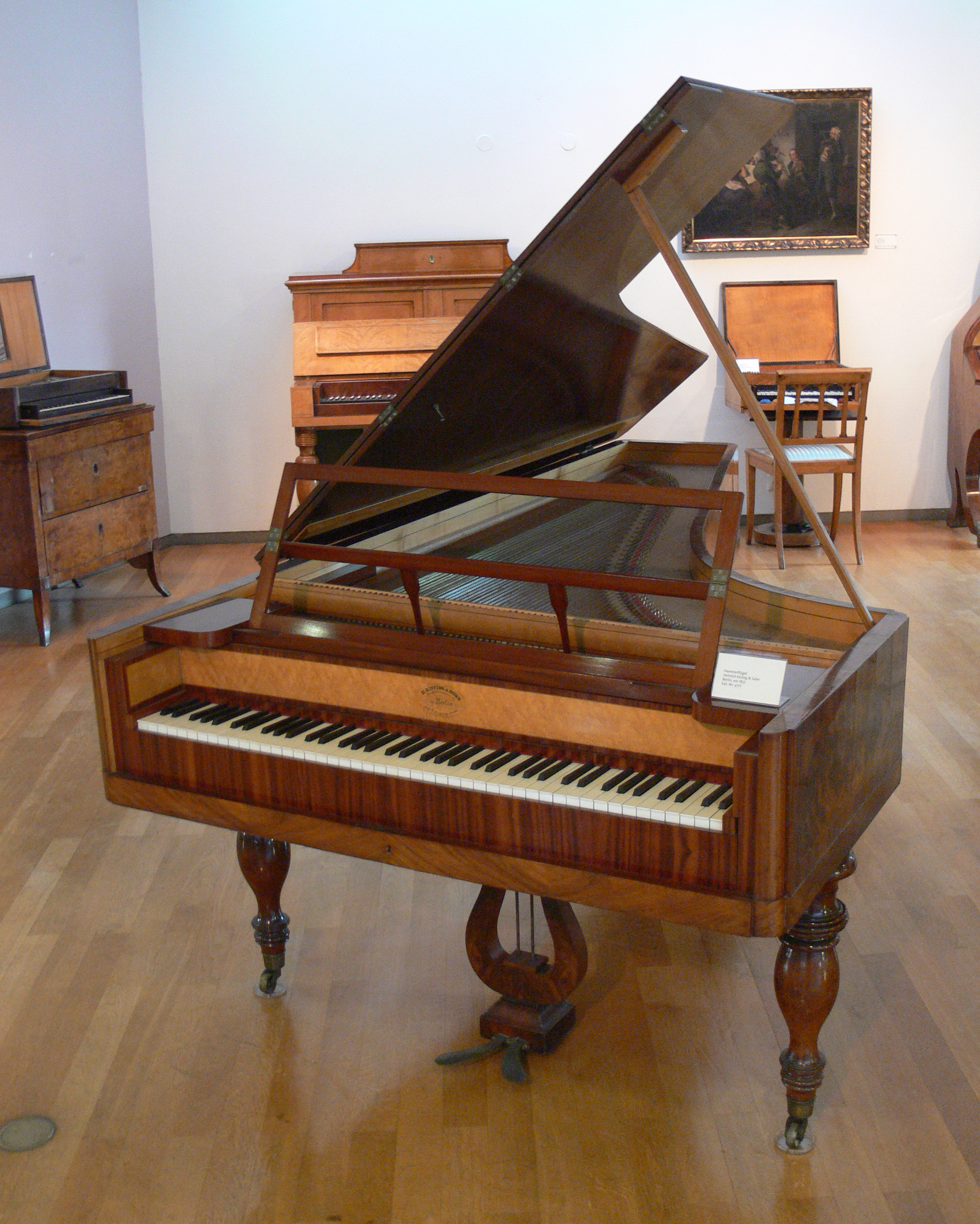 Hammerflügel, Heinrich Kisting & Sohn, Berlin, vor 1837, Detail Musikinstrumentenmuseum Berlin